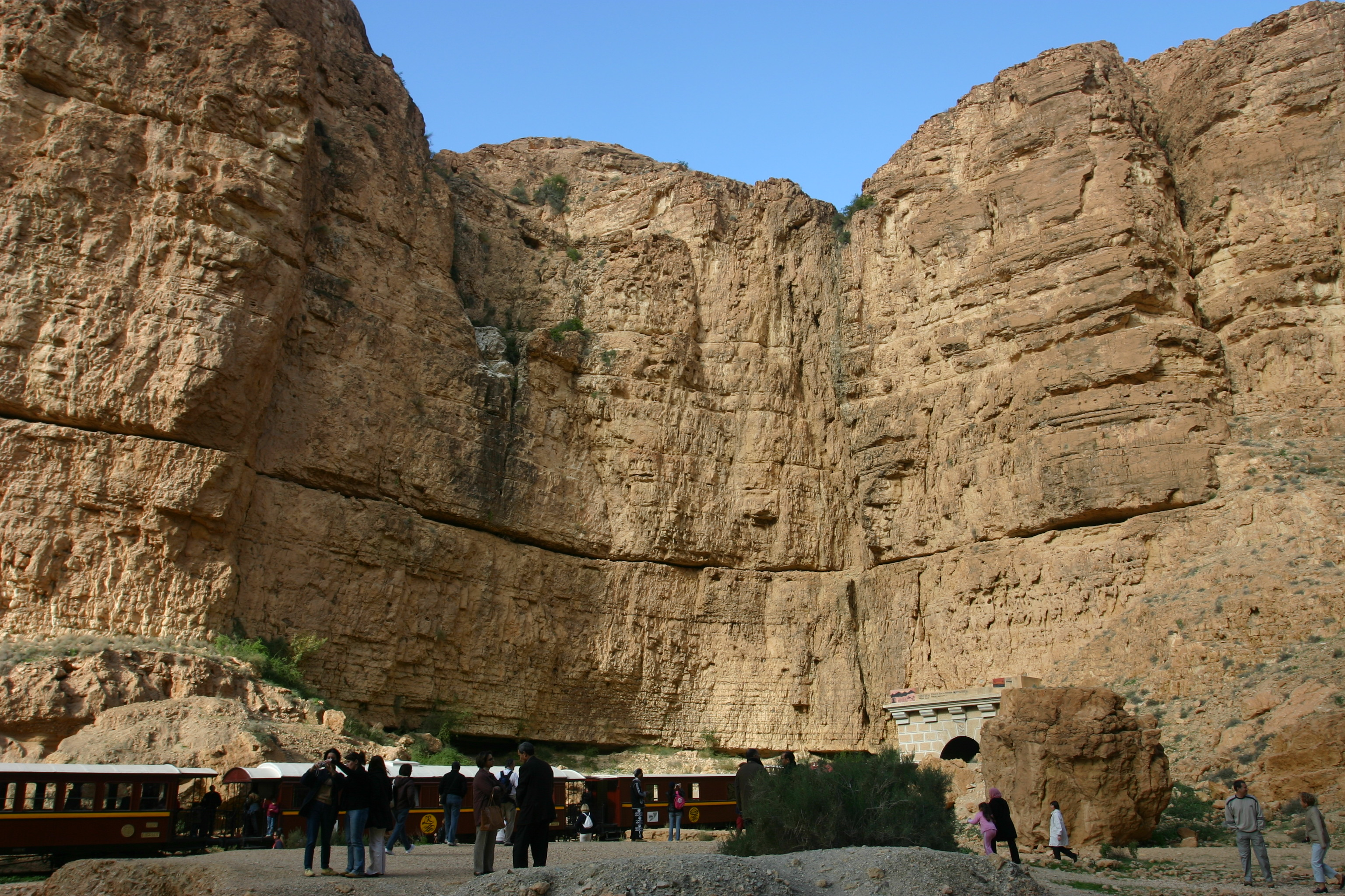 Photographie personnelle prise en décembre 2004 lors d'une halte du train touristique "Lézard rouge" entre Metlaoui et Redeyef. On peut observer les parois de ce prodigieux canyon en arrière-plan.